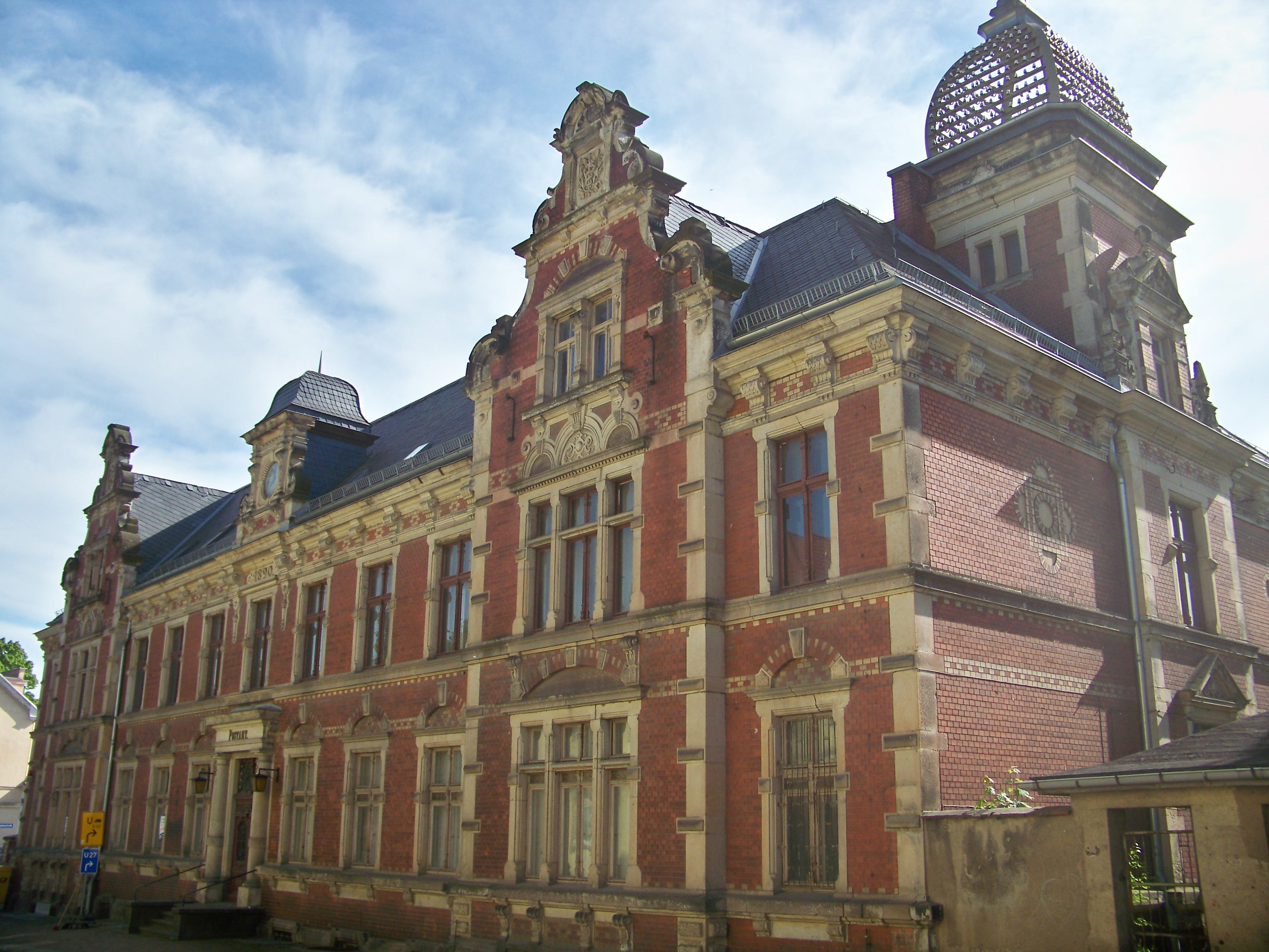 Altes Postamt in Wurzen